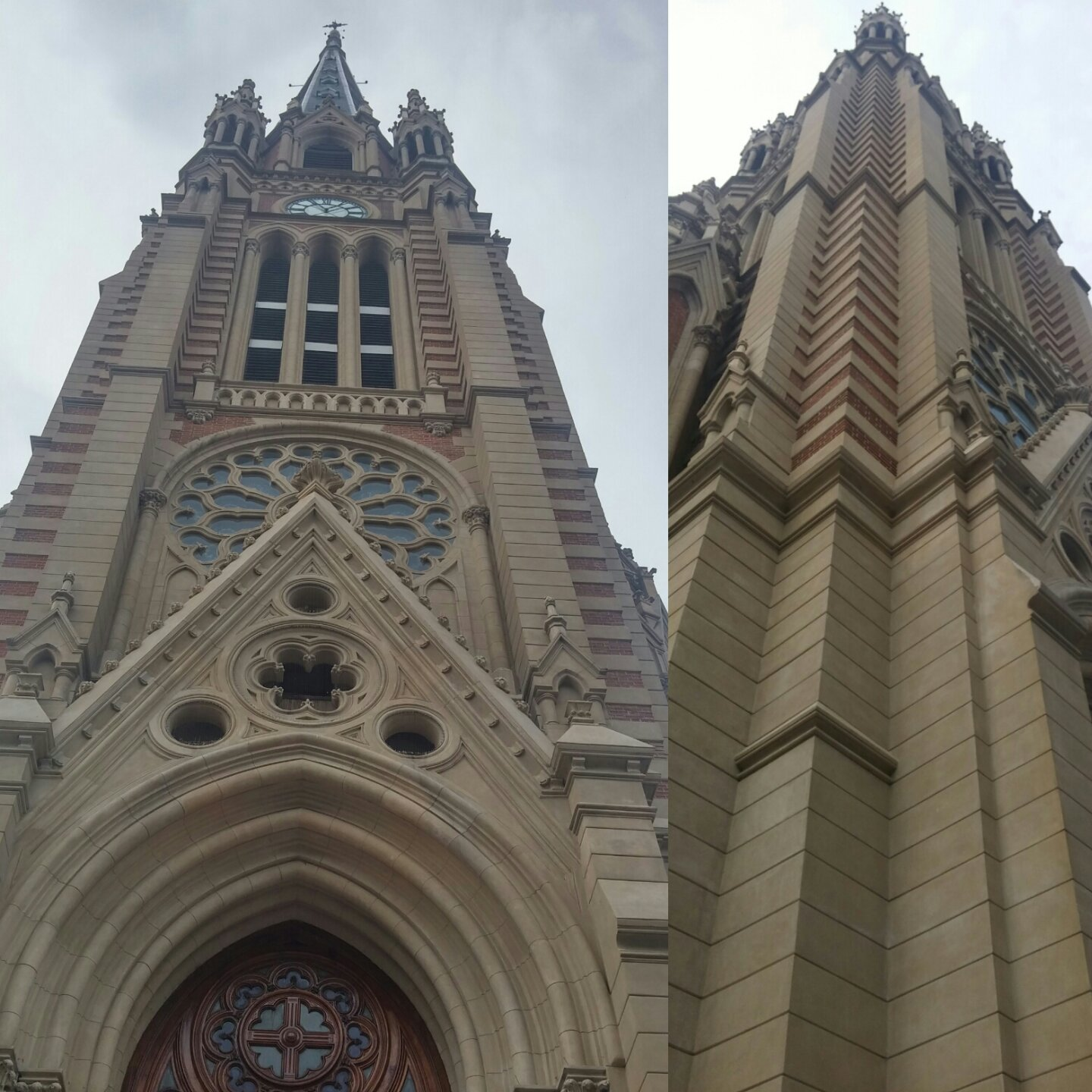 Se puede observar su arquitectura compleja, que tiene como materia prima el ladrillo común. Donde se es utilizado con la mas pura fineza y limpieza.